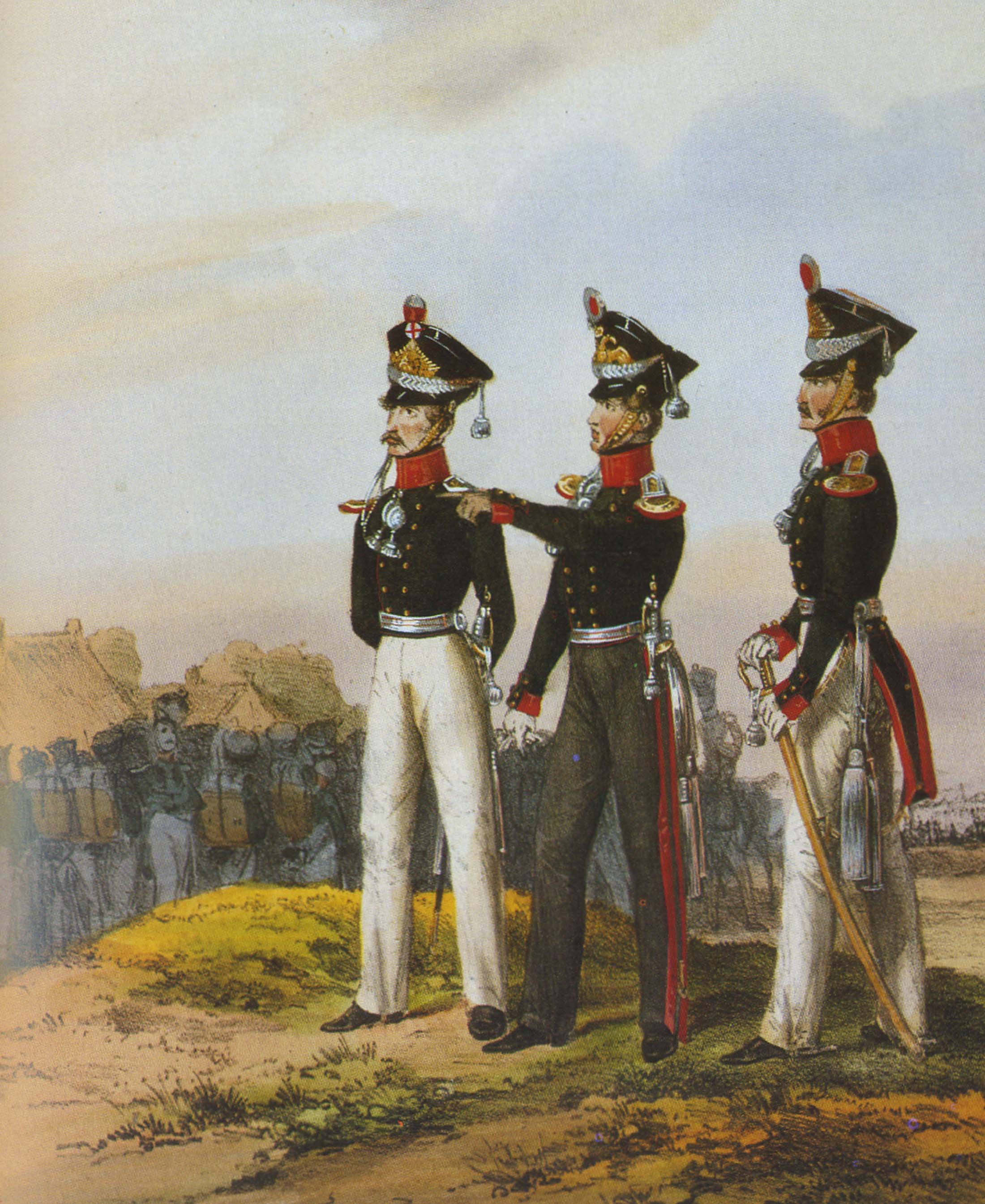 Offiziere der Hanseatischen Brigade Bremen,Lübeck, Hamburg Mitte des 19.Jahrhunderts